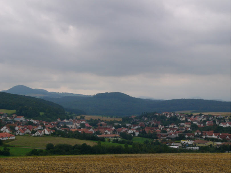 Das Foto zeigt den Ort Hofbieber, welcher der Hauptort der Gemeinde Hofbieber ist.